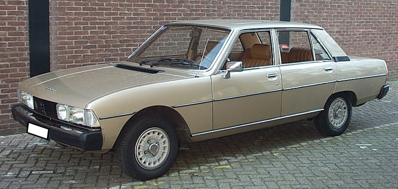 Peugeot 604 SL V6 modèle 1977